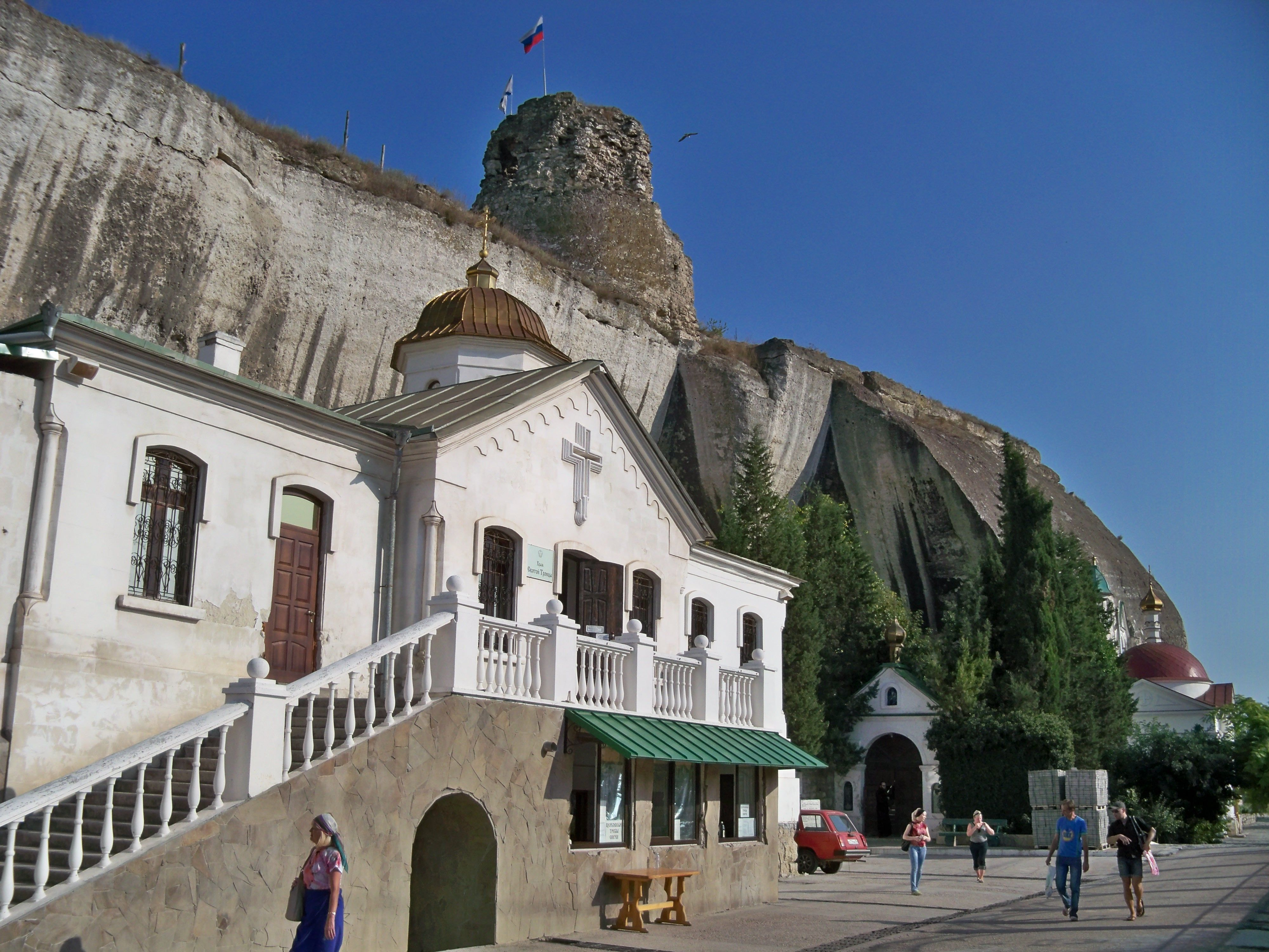 Печерний монастир, Інкерман